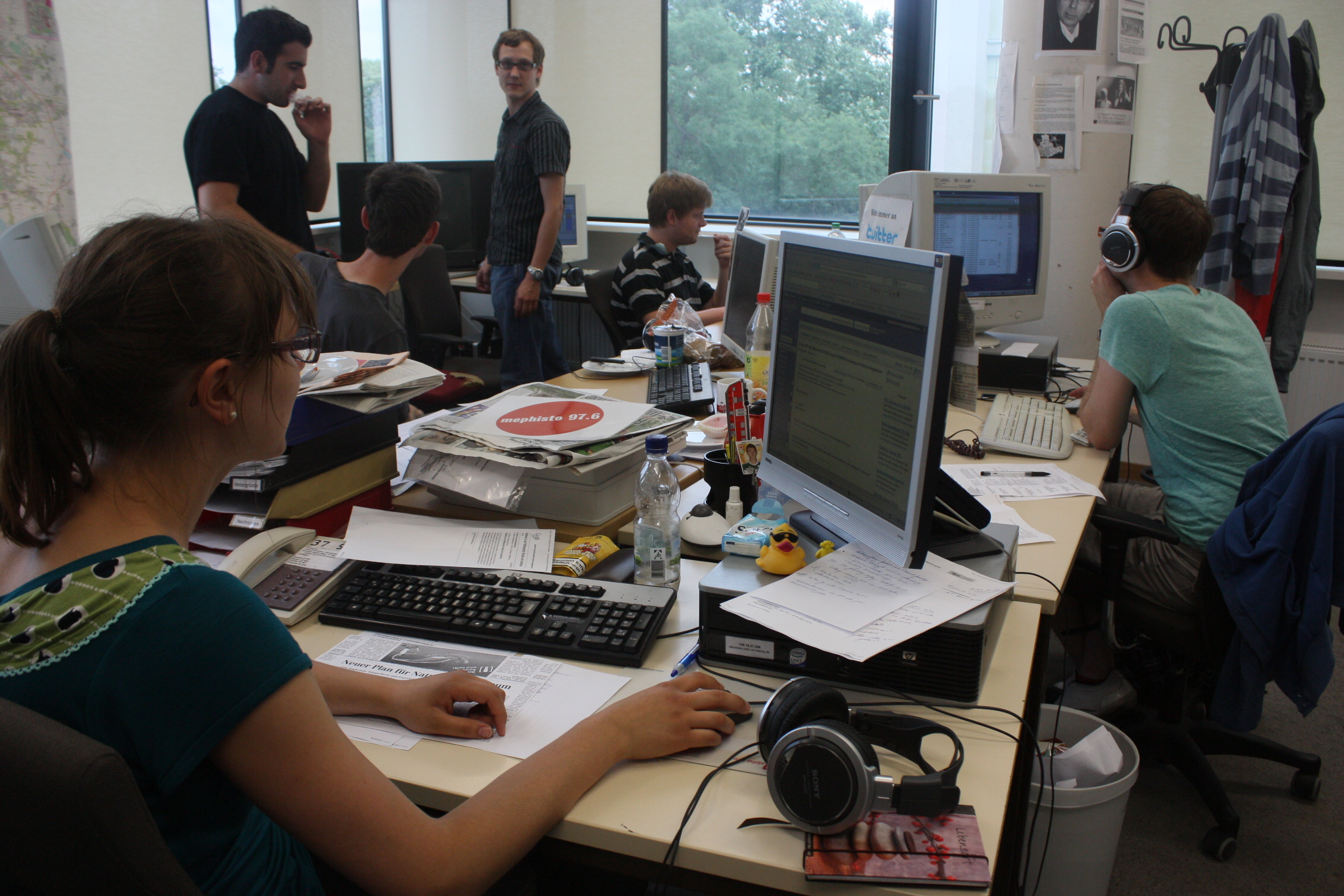 das Redaktionsbüro der tagesaktuellen Redaktion